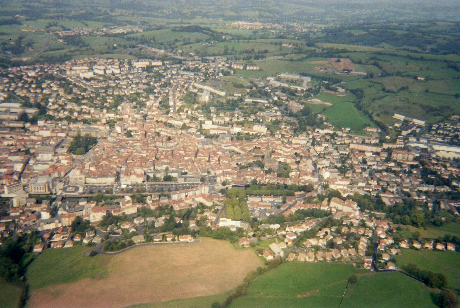 Vue aérienne d'Aurillac, Cantal, France